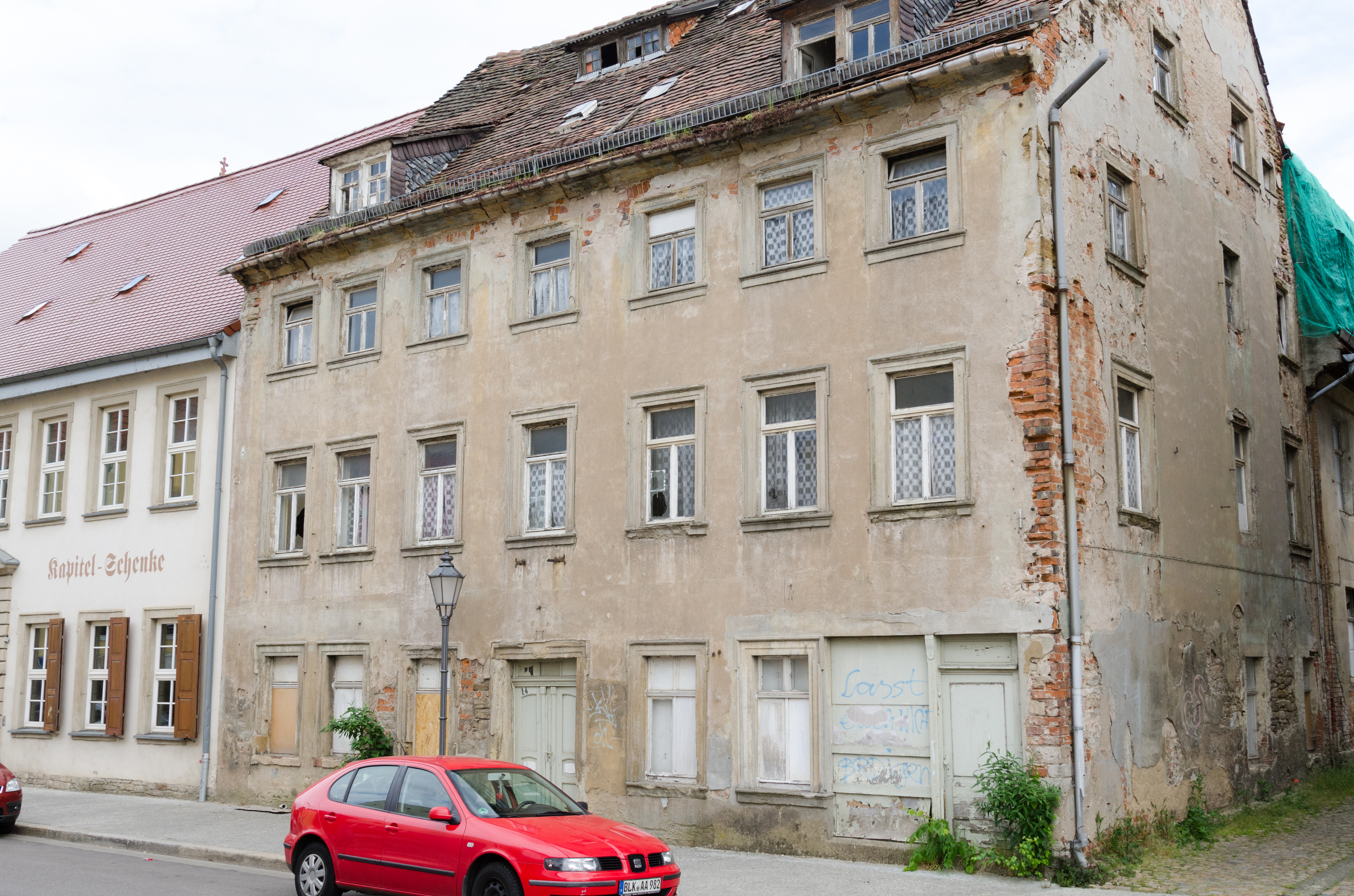 Zeitz, Brühl 24